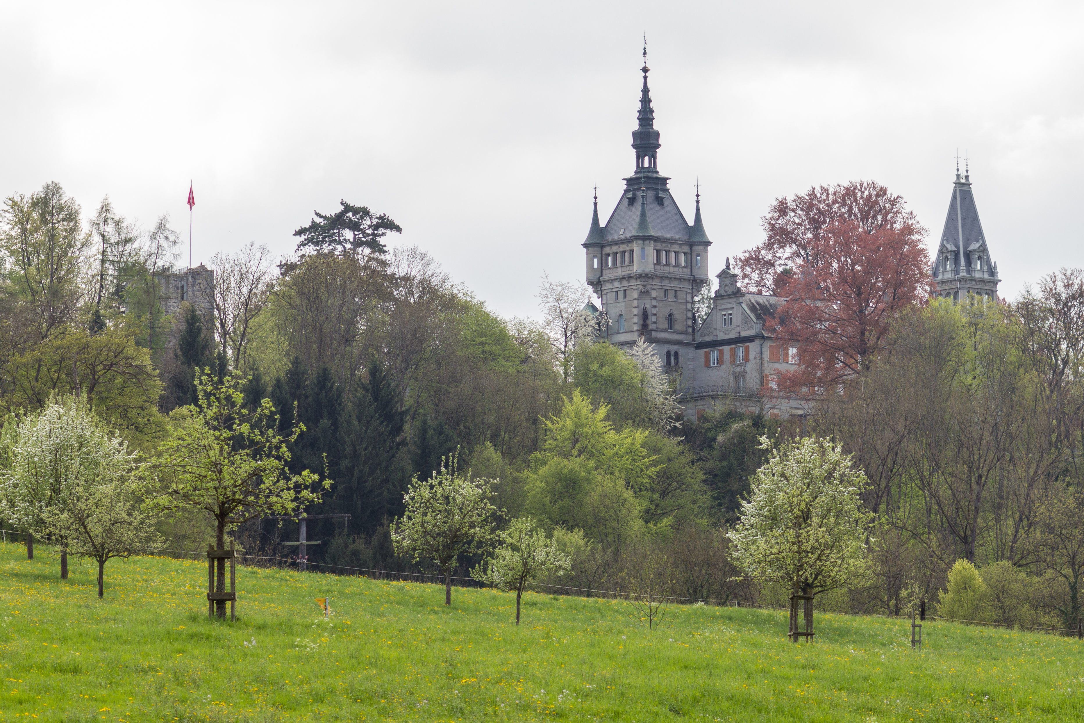 Burg(ruine) und Schloss Castell in Tägerwilen TG (2013)